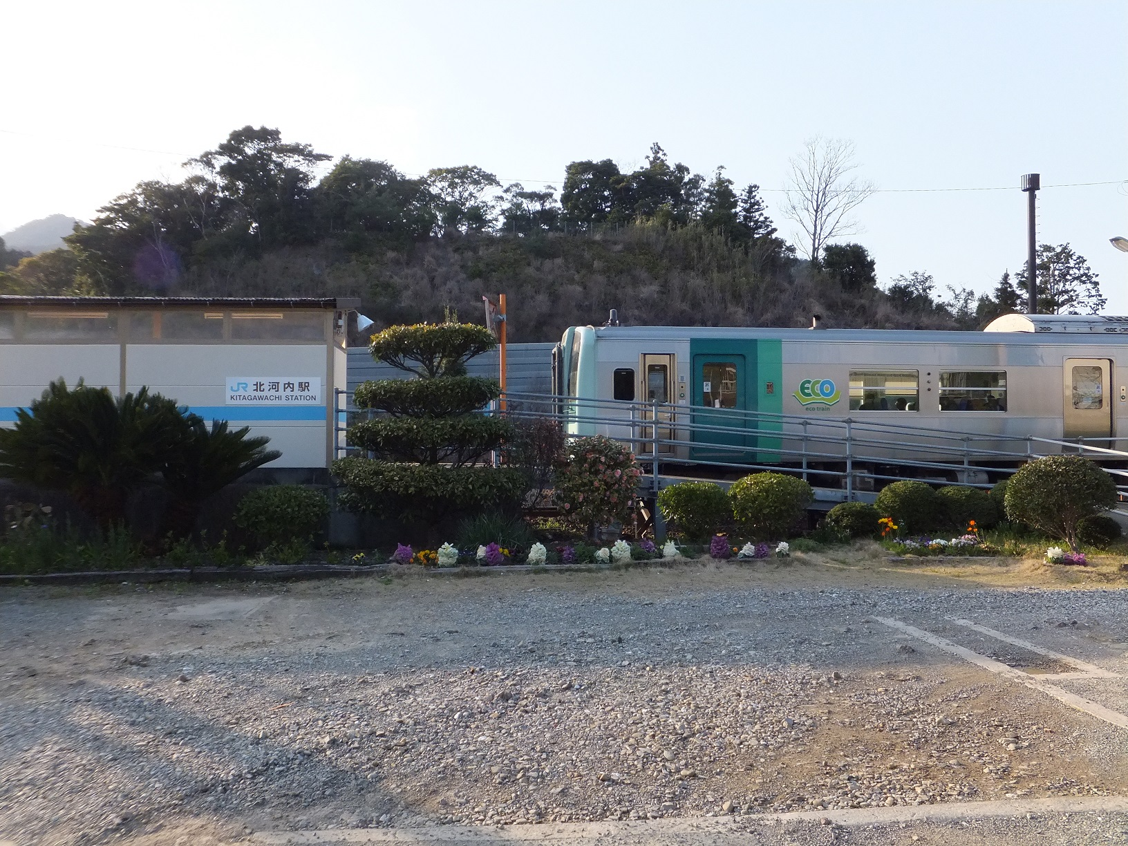 JR牟岐線 北河内駅 （徳島県海部郡美波町）